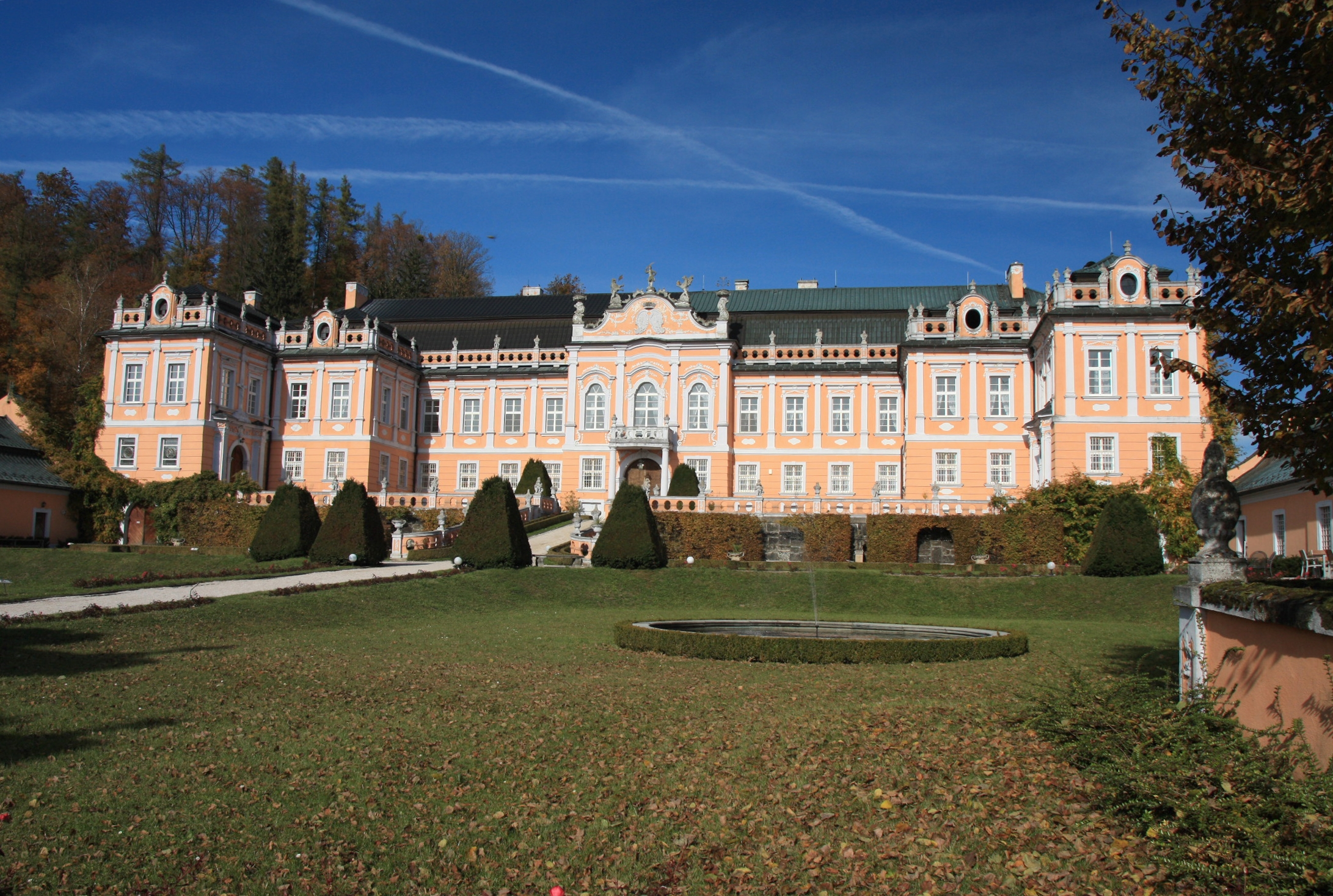 Zámek Nové Hrady, Nové Hrady 1, Nové Hrady (okres Ústí nad Orlicí).